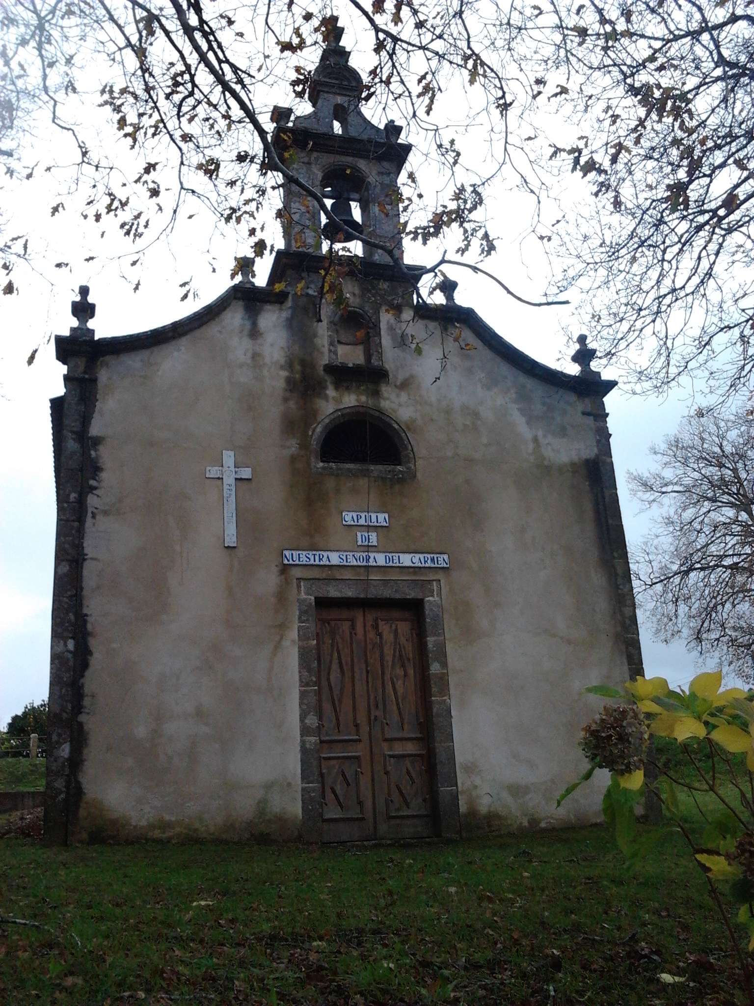 Igrexa de Nosa Señora do Carme, na parroquia de Santo Estevo de Parada, no lugar das Capelas (Enxerto), Concello de Oza-Cesuras